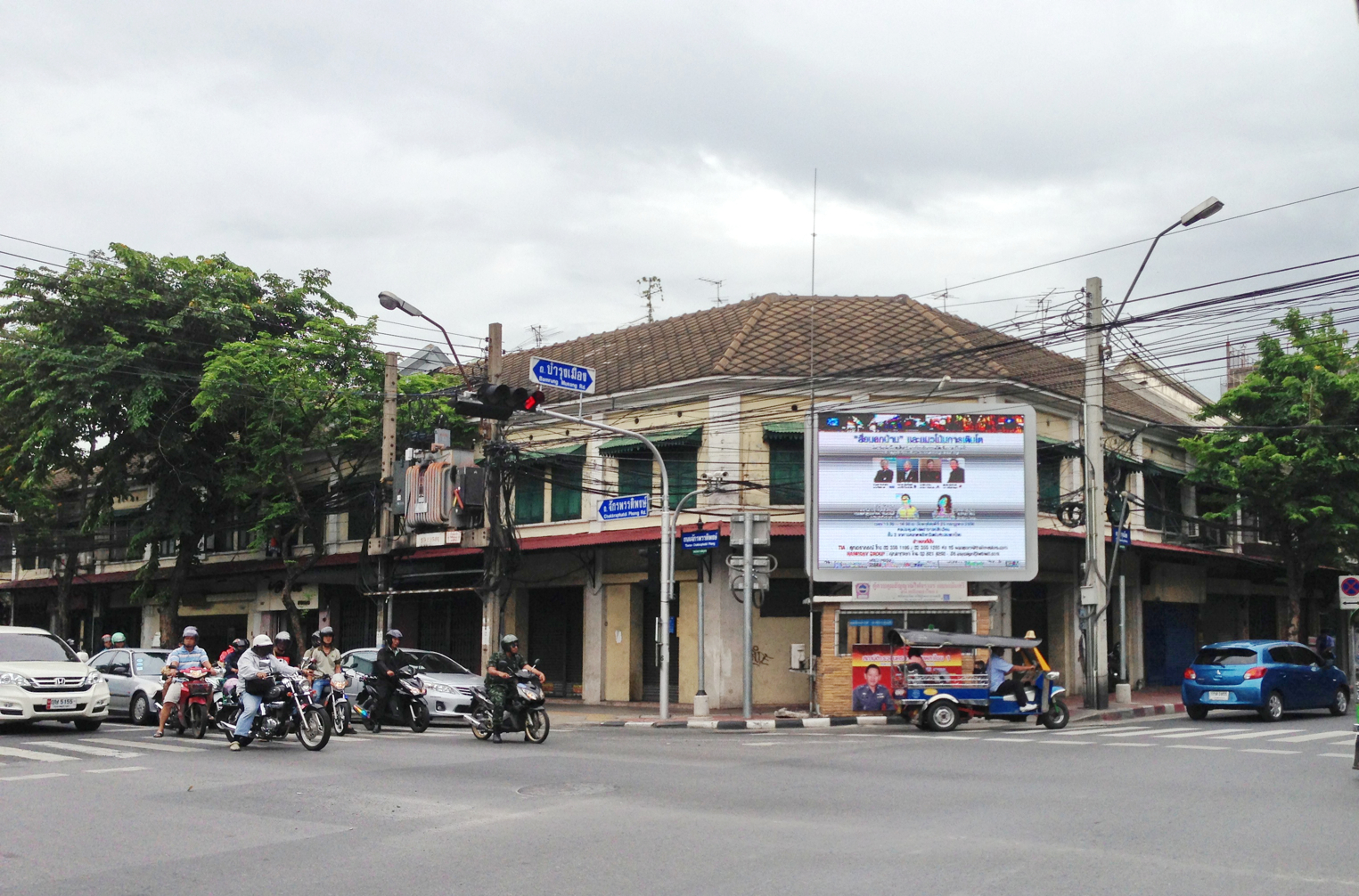 Thanon Bamrang Muang- worachak, Wat Thepsirin,Pom prap sattru Phai, bangkok